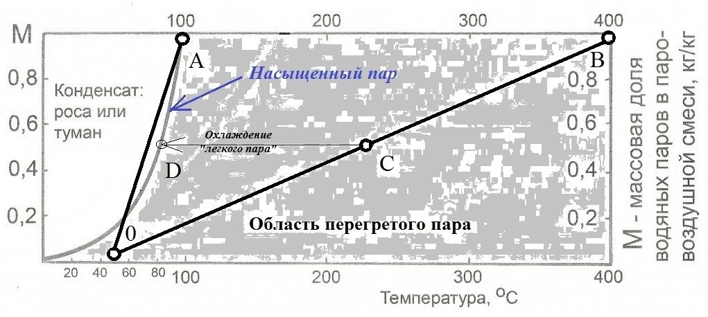 Баннопаровая диаграмма